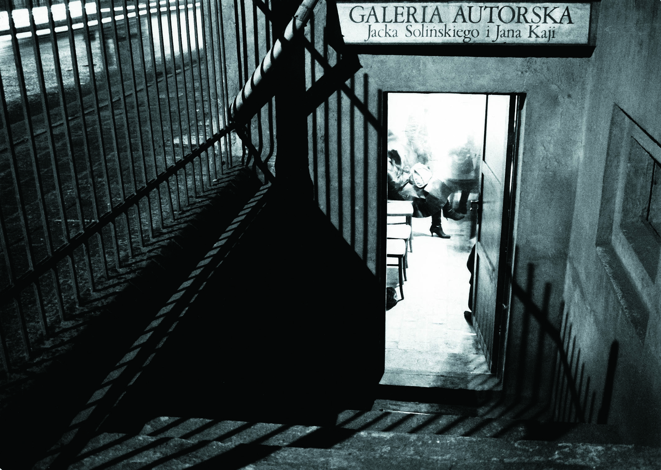 Fotografia S. Wasilewskiego przekazana do użytku Galerii Autorskiej